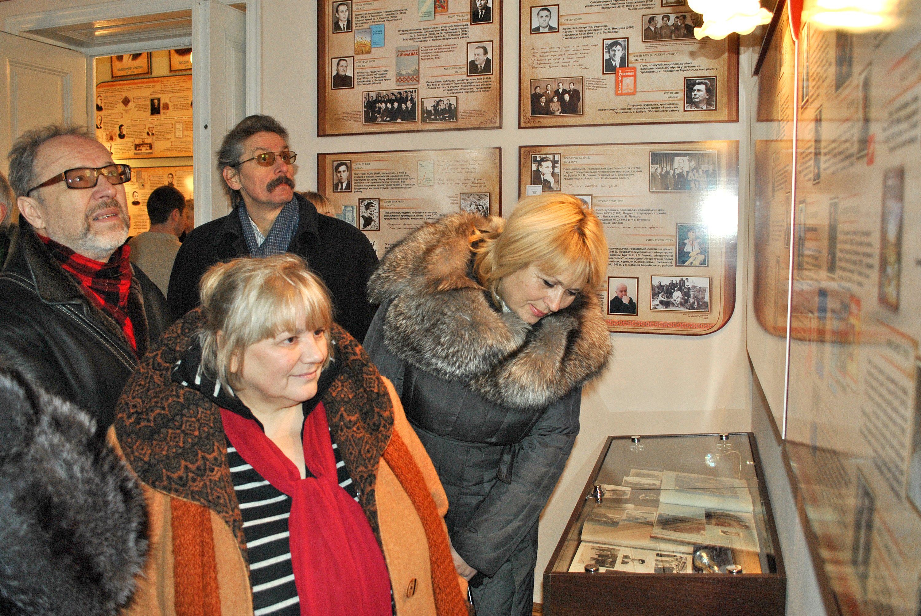 Письменники Тернопілля оглядають експозиції музею «Літературне Тернопілля» в день відкриття 6 грудня 2012 року.